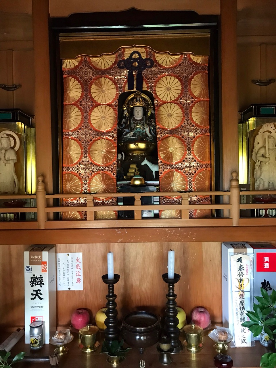 妙圓寺弁天堂内佛